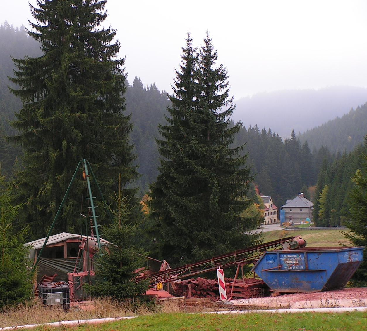 Sanierung der Tagebrüche auf dem Urbanus Stolln in Oberwildenthal 2010; im Hintergrund rechts das alte Zollamt und links der ehemalige Gasthof Geyer, später Textima Ferienheim - 2010 abgerissen